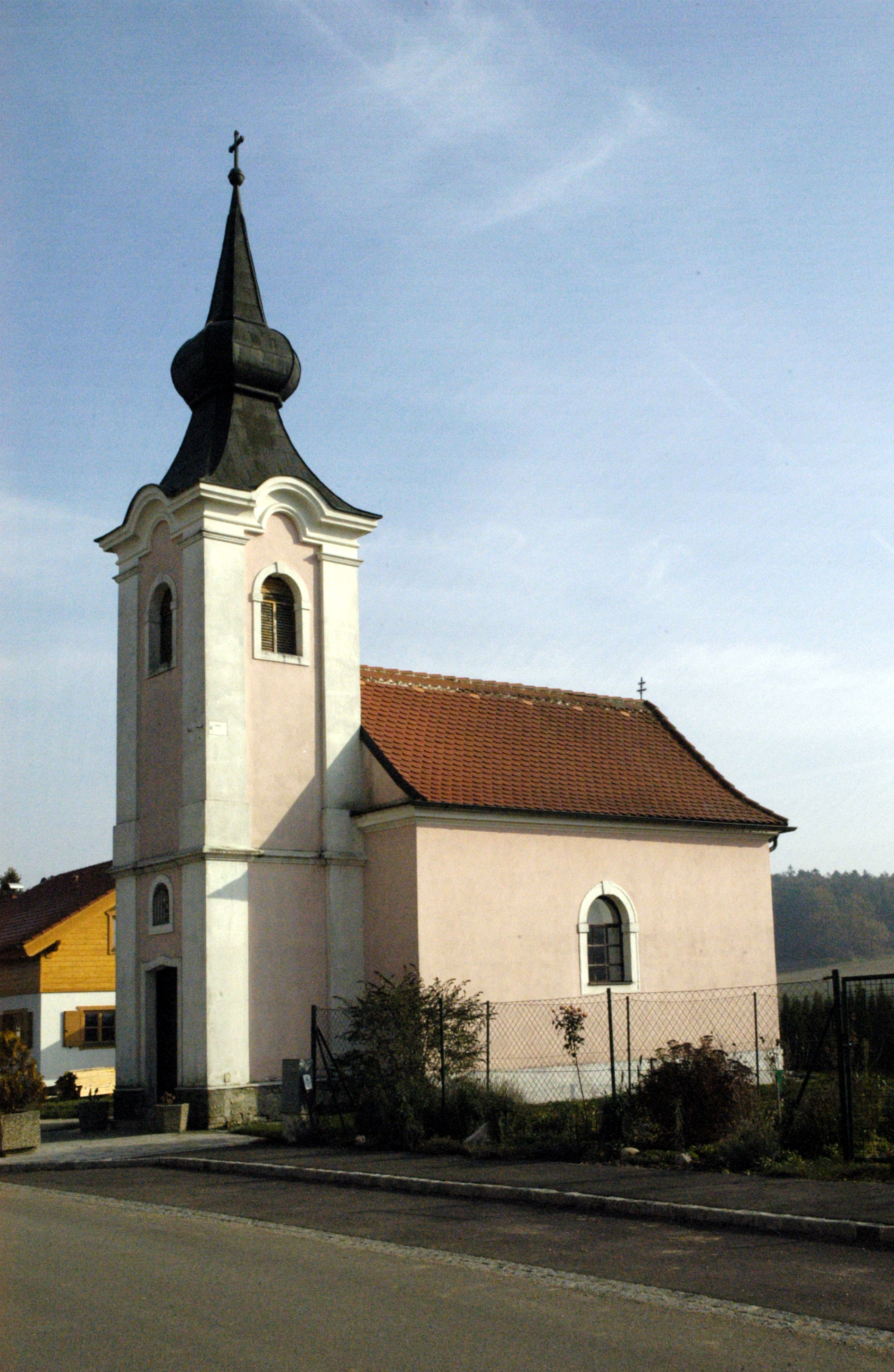 Ortskapelle in Reikersdorf, Gemeinde Maissau